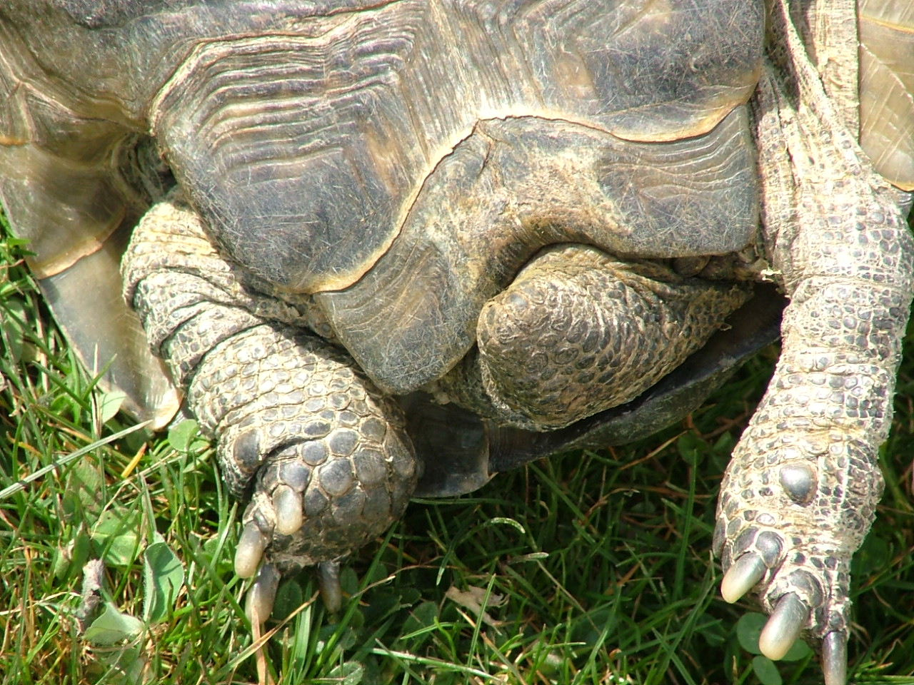 Testudo graeca ibera Männchen Richard Mayer ,selbst fotografiert